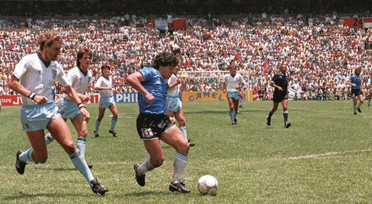 Maradona hace el mejor gol de toda la Historia ante Inglaterra.